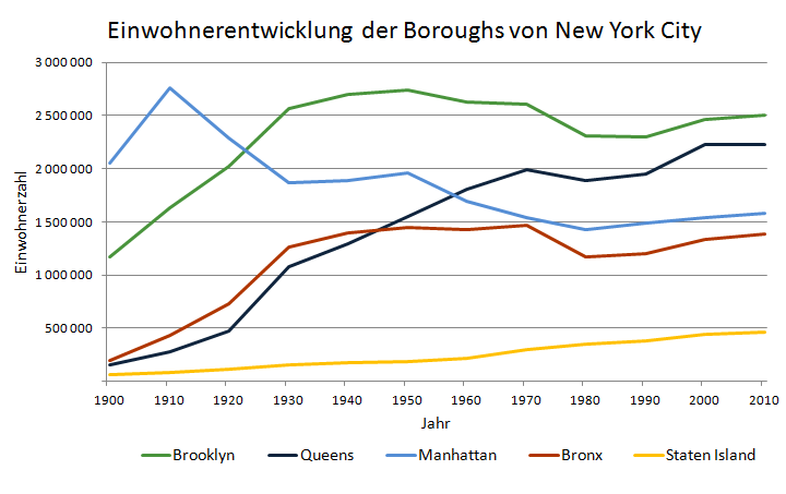 Einwohnerentwicklung der Bezirke von New York City zwischen 1900 und 2012